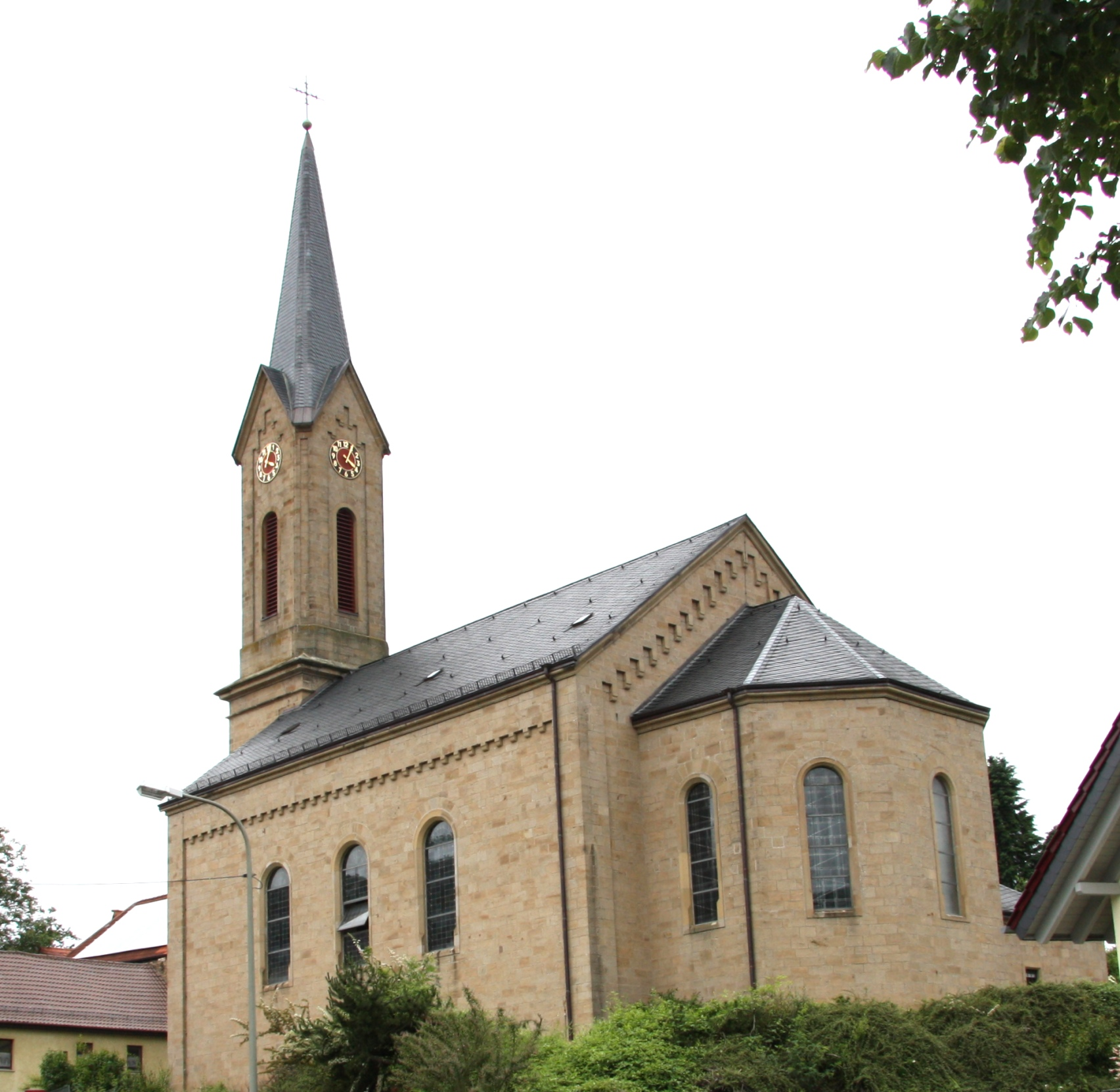 Katholische Pfarrkirche St. Johannes Nepomuk in Reipoltskirchen.